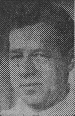 Yngve Ahlbom